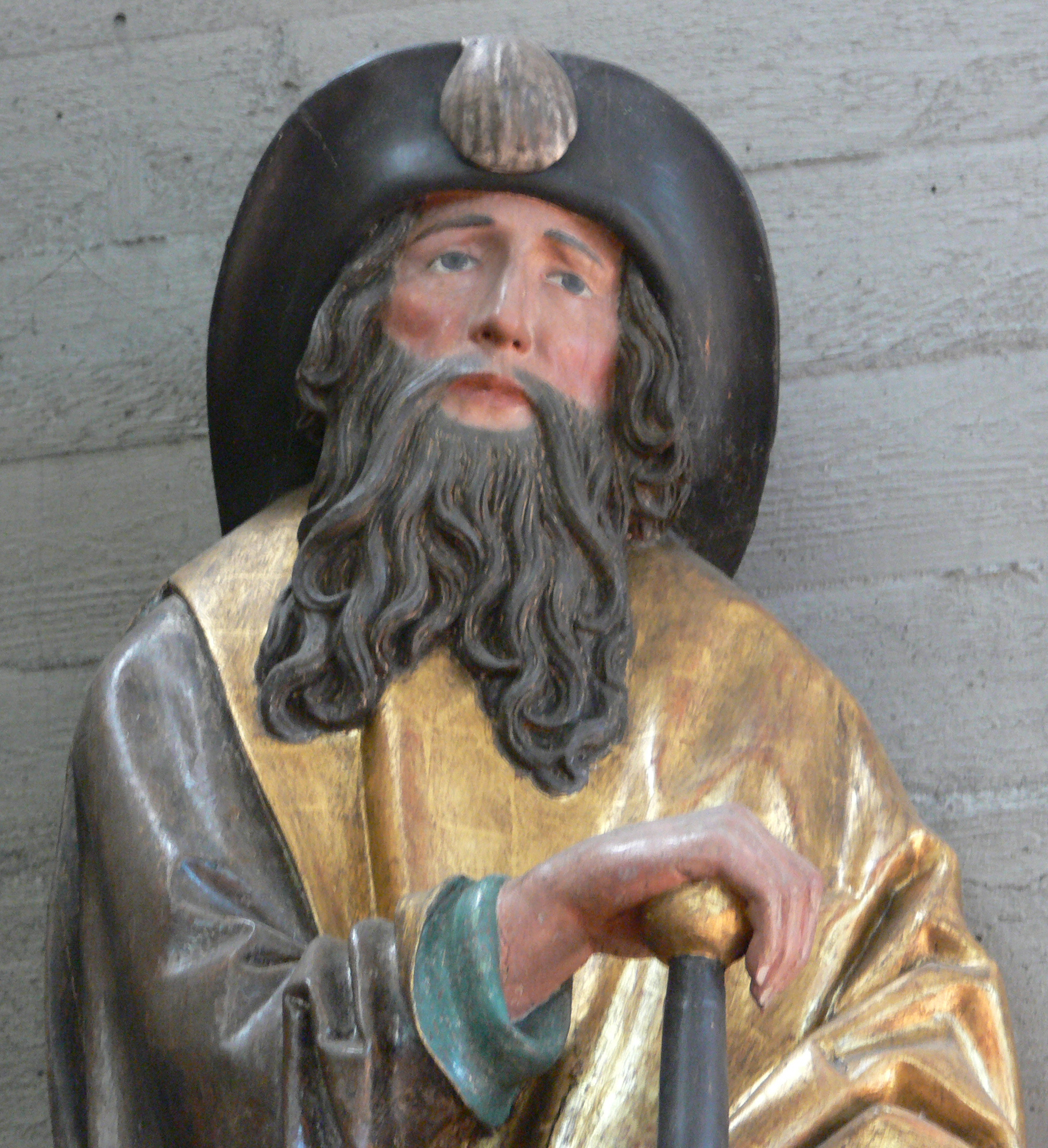 Pfarrkirche St. Jakobus, Brochenzell, Gemeinde Meckenbeuren, Bodenseekreis Figur „Hl. Jakobus der Große“, Anfang 16. Jh., Detail